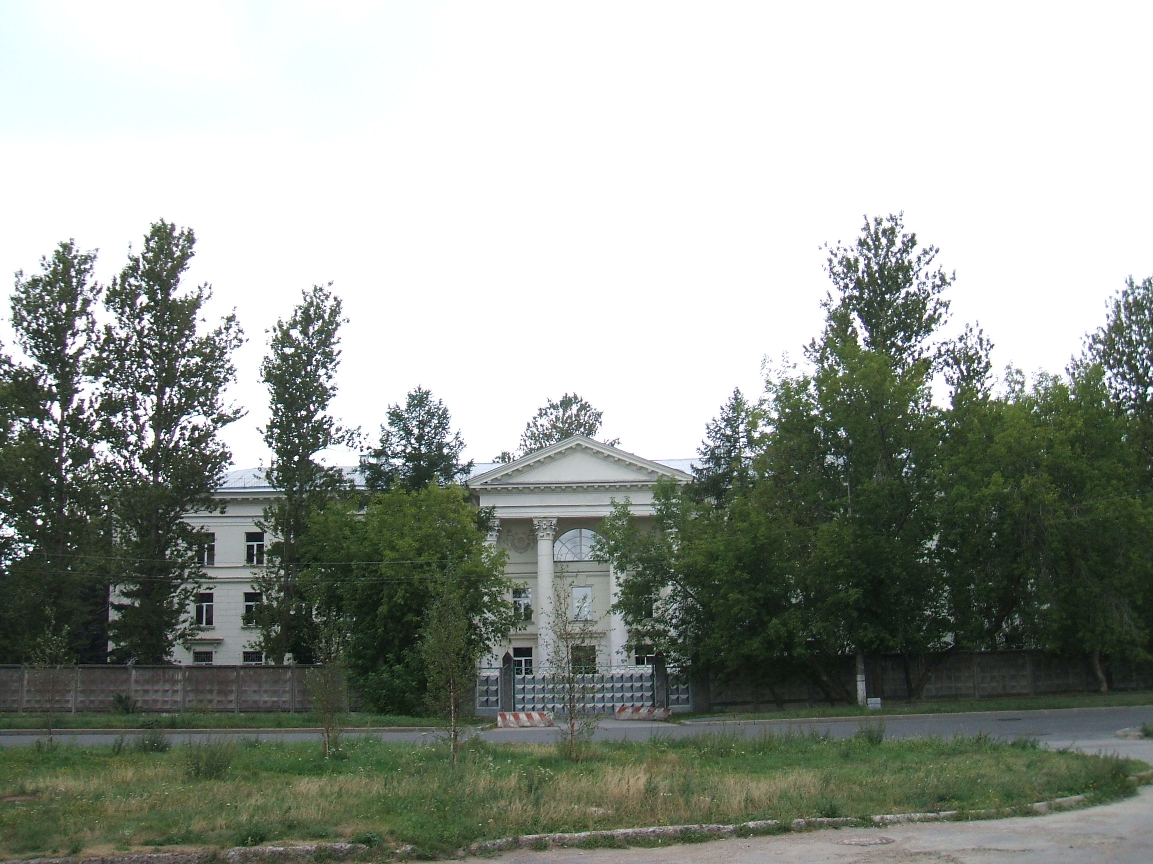 Здание пограничников в Сестрорецке СПб